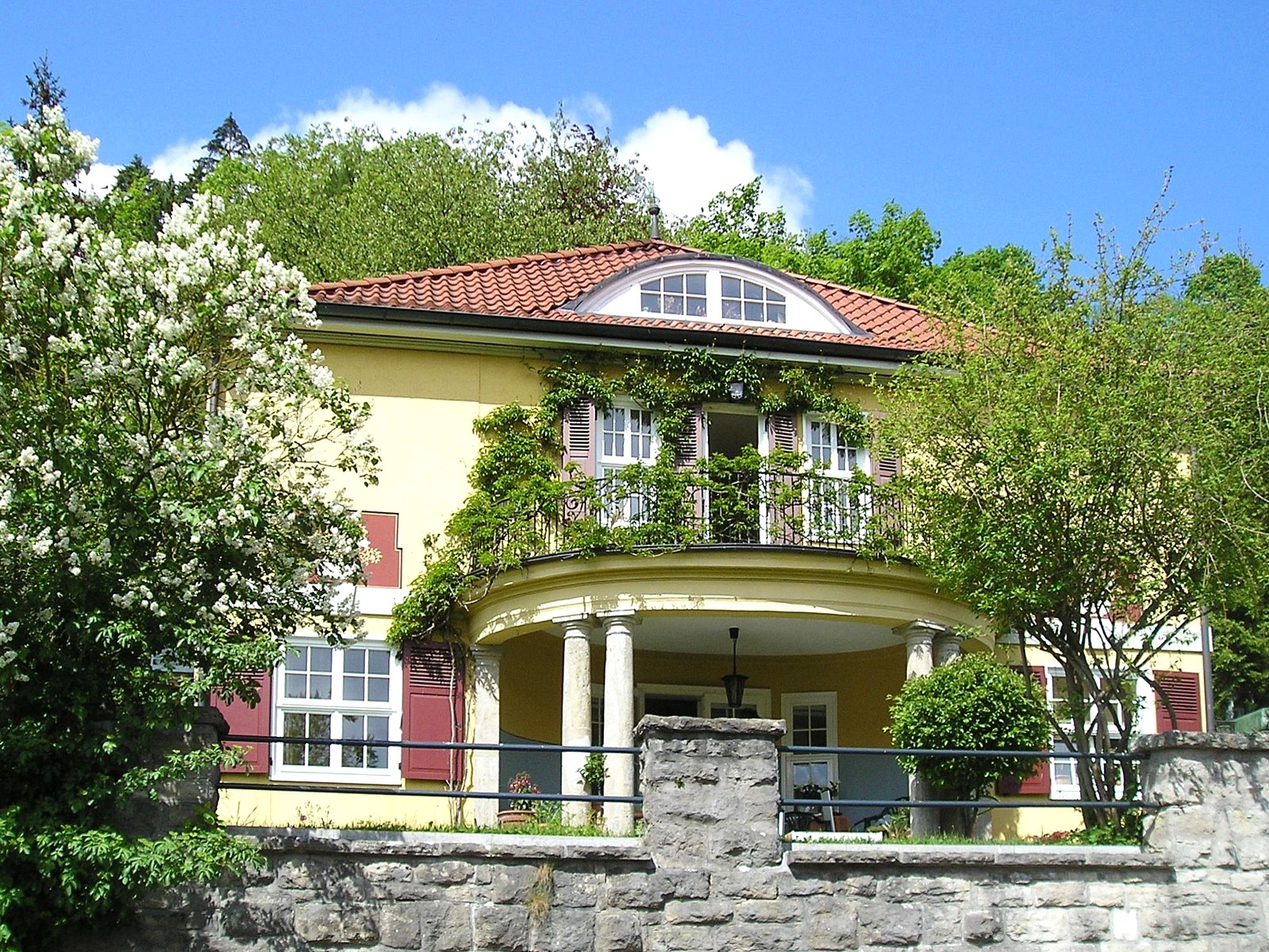 Villa in Meiningen, einst das Wohnhaus von Günter Raphael